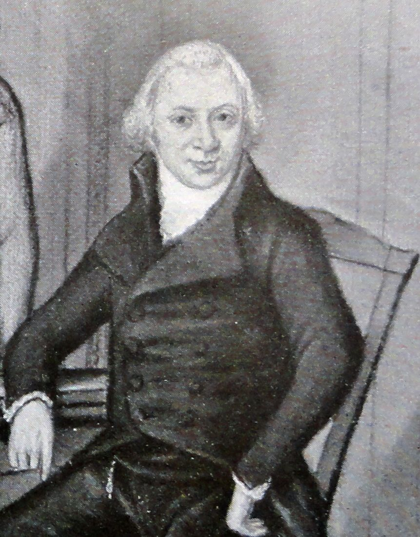 Portret van Paulus Nijhoff op omstreeks 42-jarige leeftijd, uitsnede uit een grotere prent